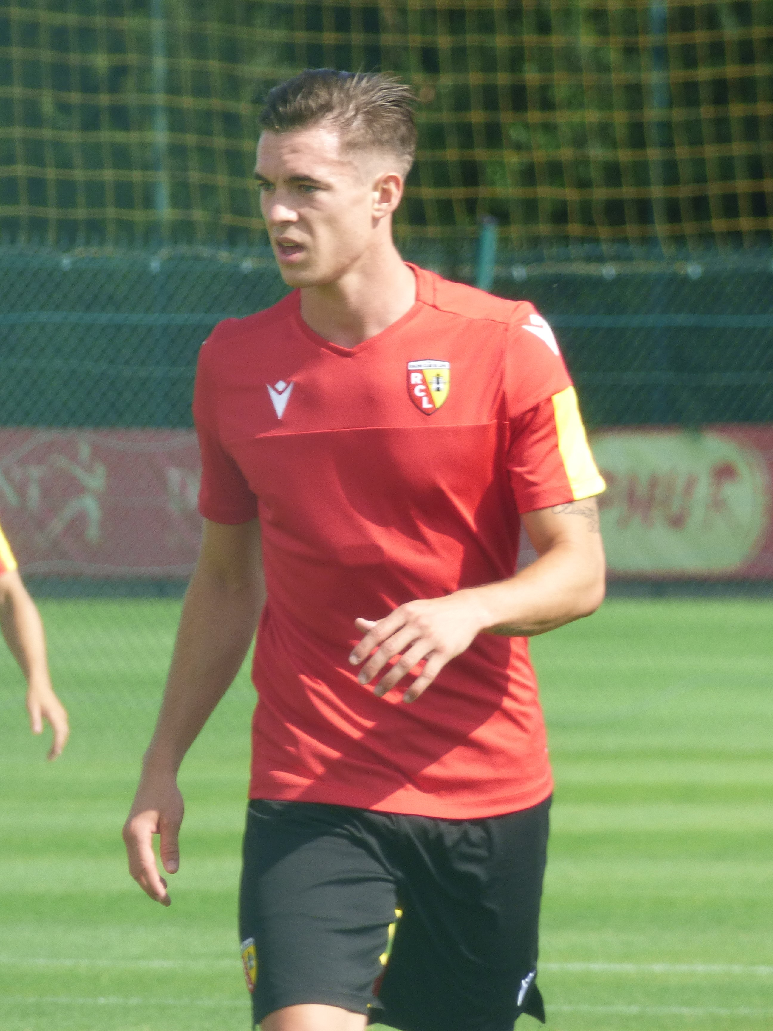 Clément Michelin lors de l'entraînement public du Racing Club de Lens, au centre technique et sportif de La Gaillette le 2 juillet 2019